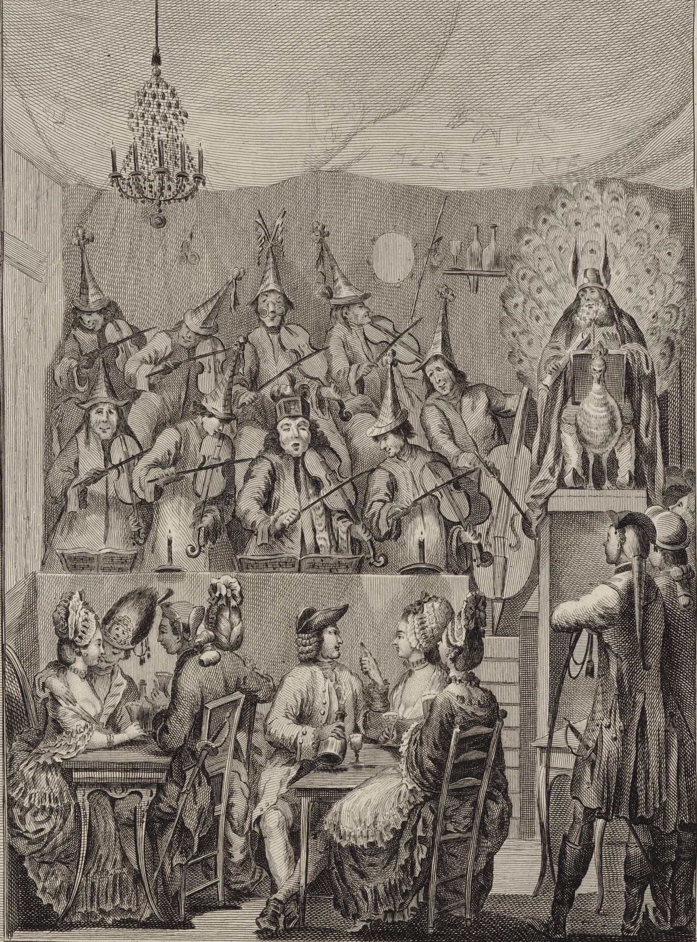 Grand concert extraordinaire exécuté par un détachement des quinze-vingt au caffé des Aveugles Foire saint Ovide au mois de septembre 1771 éditeur : A Paris chez Mondhare rue S.t Jacques